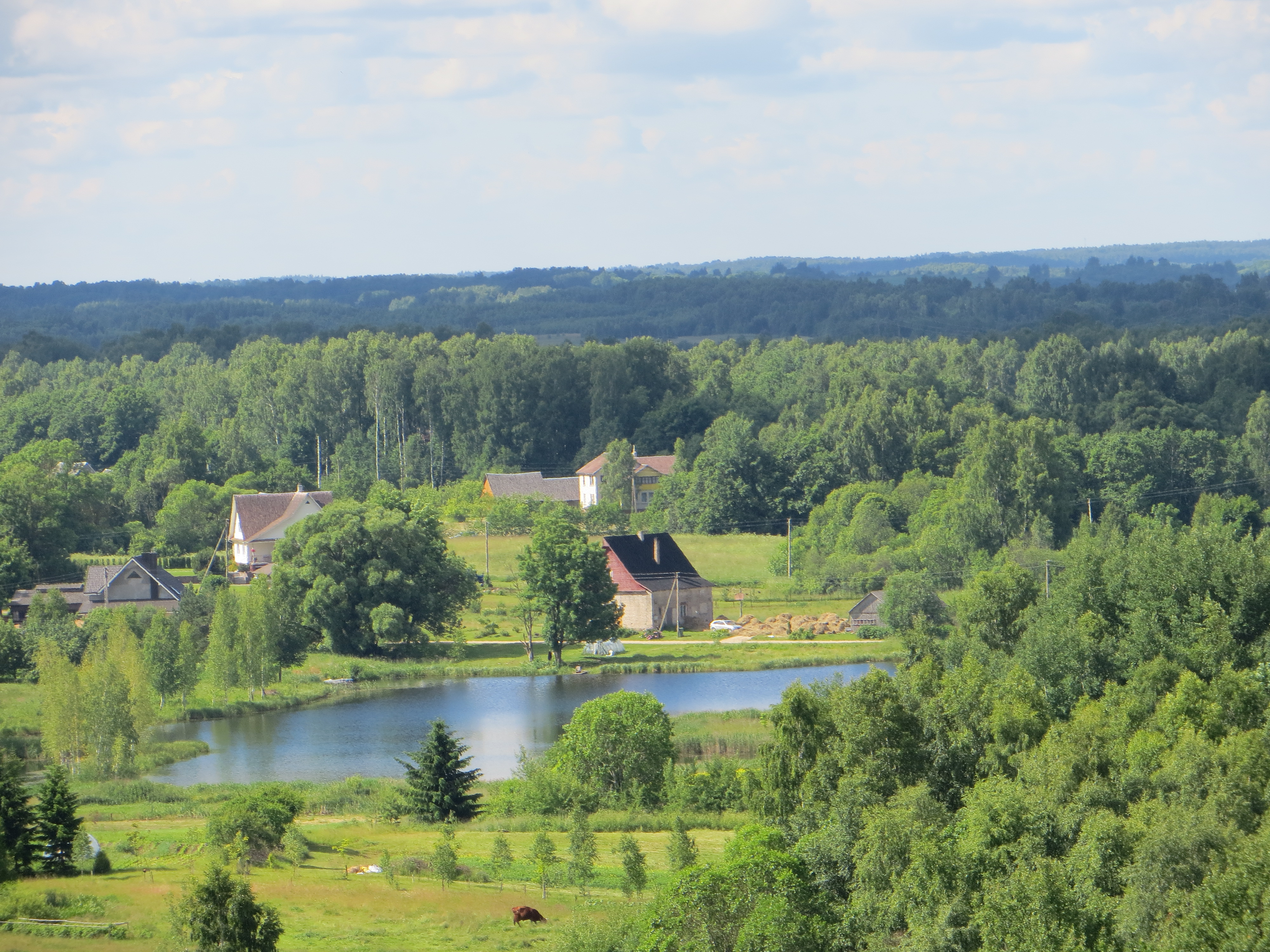 Medeniai, Lithuania